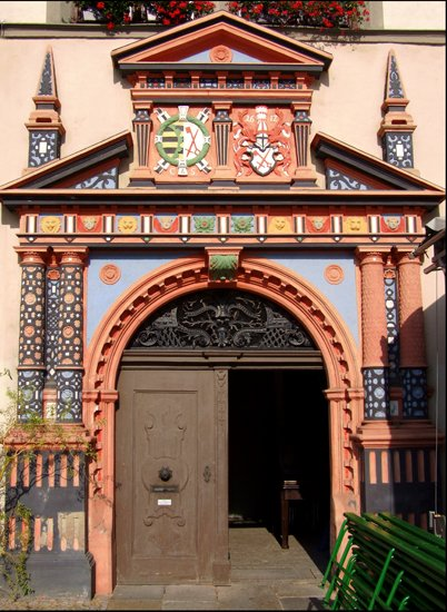 Rathaus Naumburg (Saale)